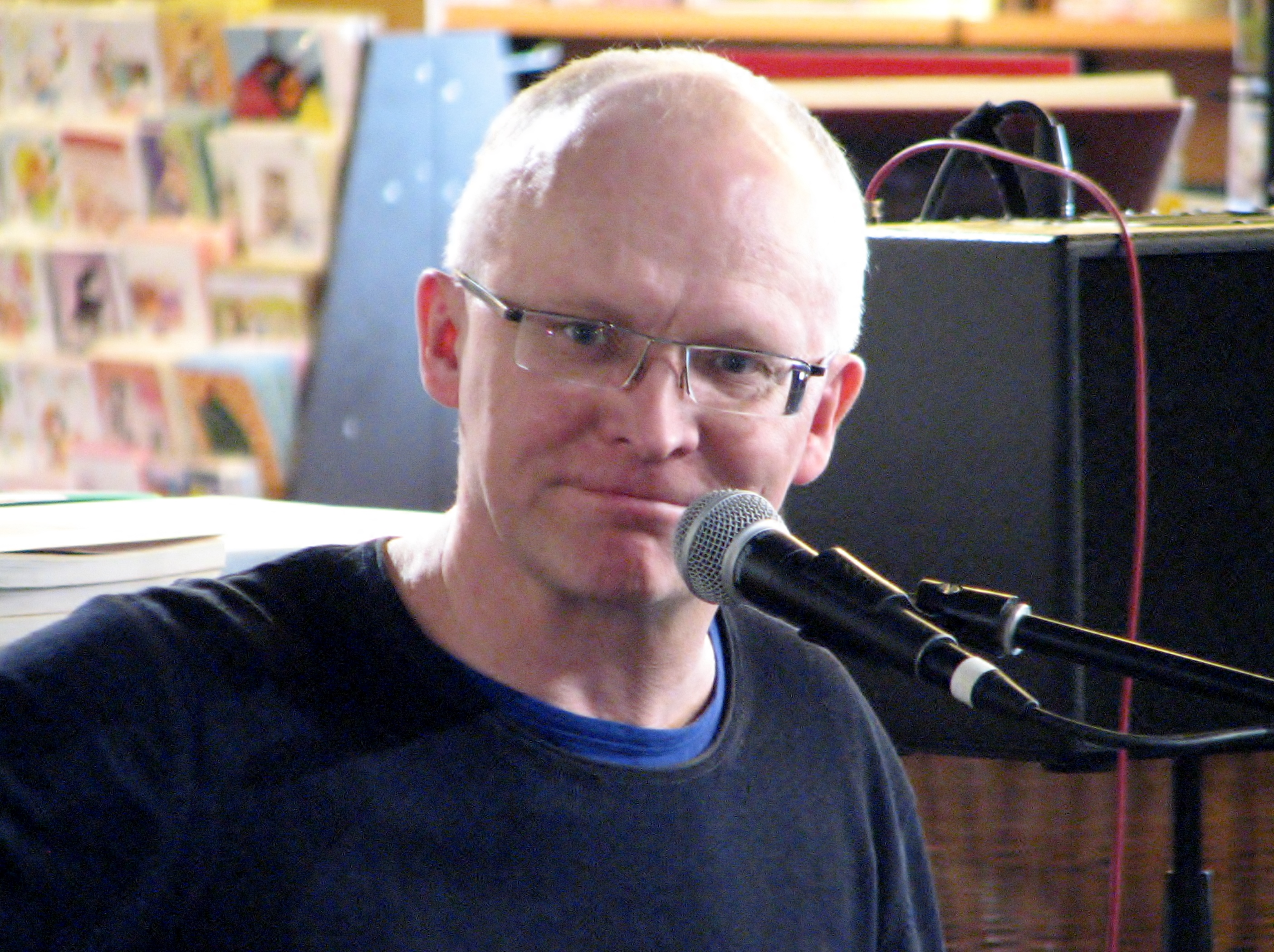 Jaan Sööt Viru keskuse Rahva Raamatus Märten Krossi raamatu "Hullumängud" esitlusel